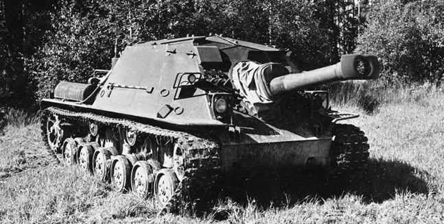 Ikv 103